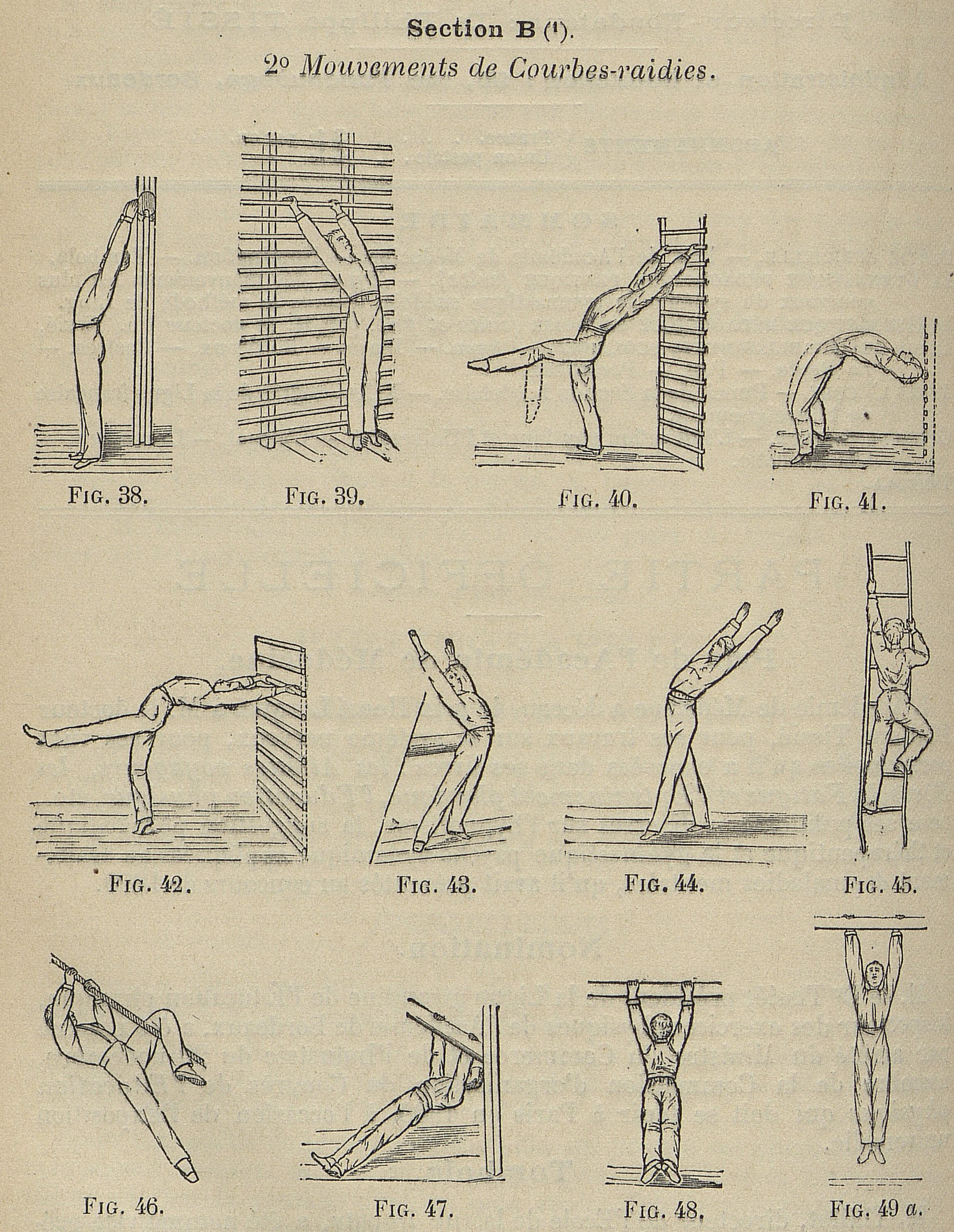 Mouvements de gymnastique suédoise d'après Ling. Mouvements d'extension à partir de poutres.